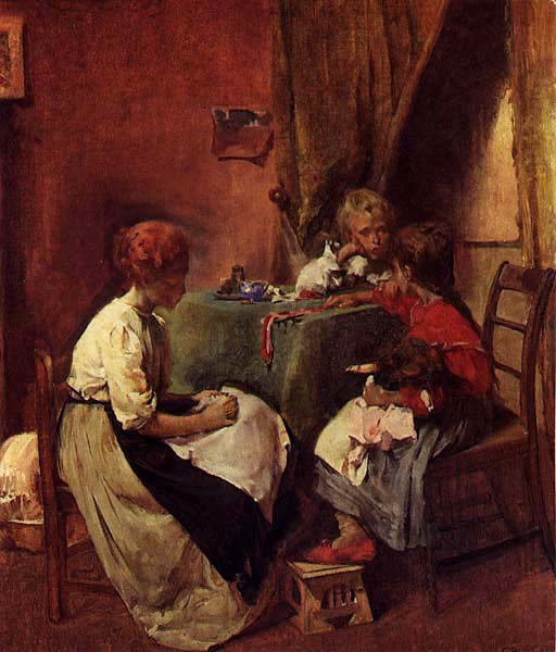 Cena Familiar.Family scenelabel QS:Lpt,"Cena Familiar."label QS:Len,"Family scene"